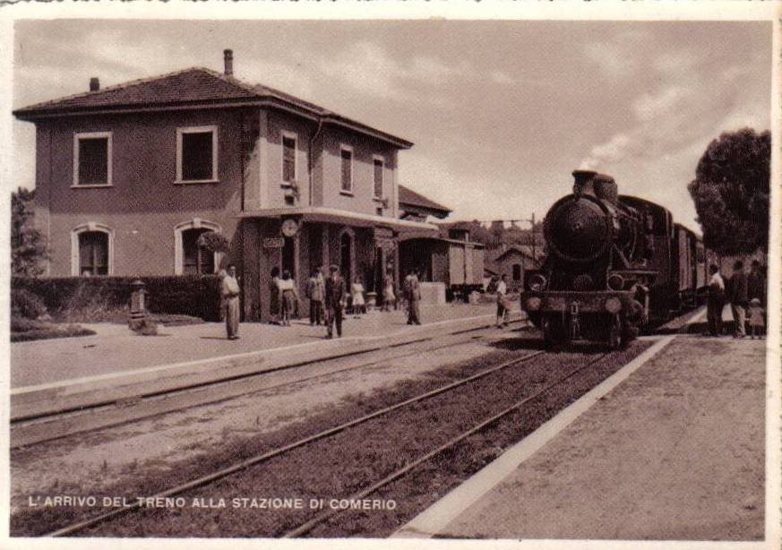 La stazione ferroviaria di Barasso-Comerio. L'immagine è anteriore al 1950, data dell'attivazione dell'esercizio a trazione elettrica.